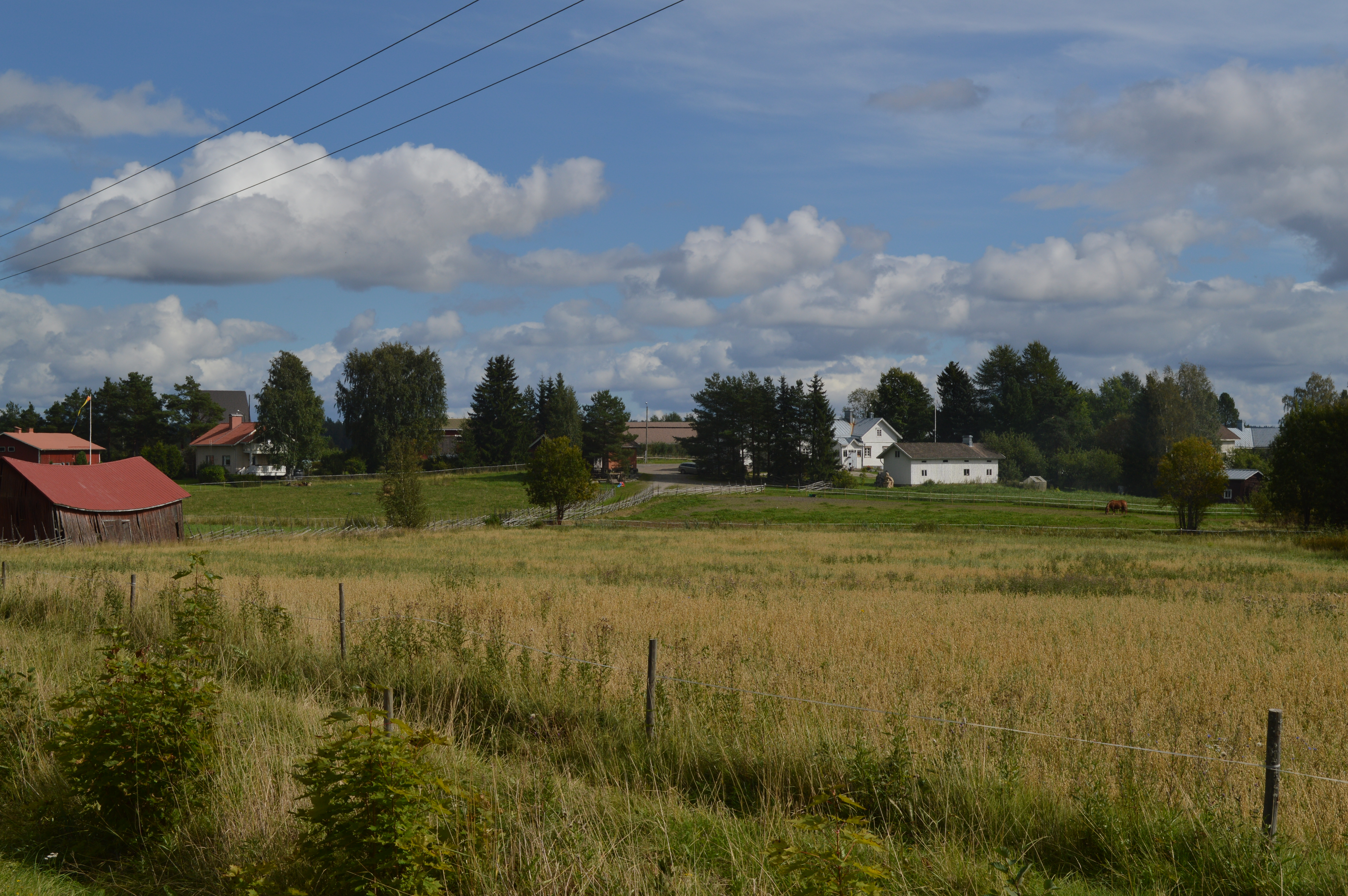 Kallialan kyläkeskusta ja sitä ympäröiviä peltoja.